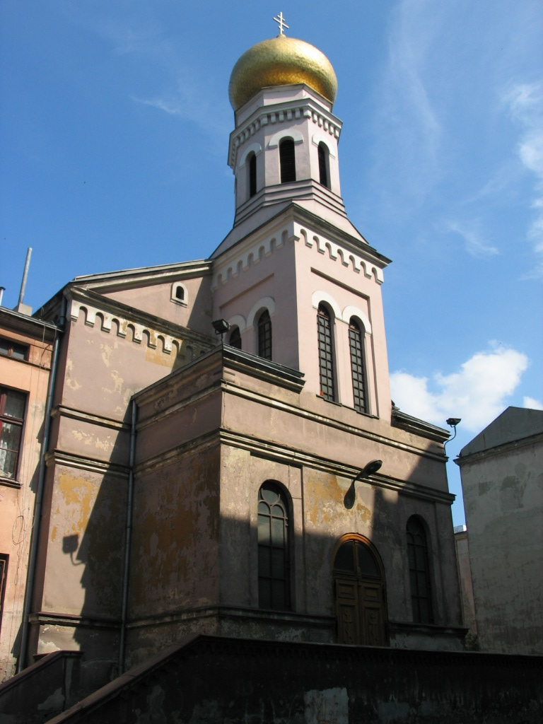 Łódź Cerkiew pod wezwaniem św. Olgi